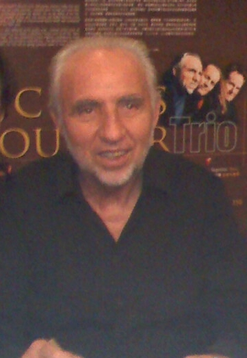 Jacques Loussier in Hong Kong